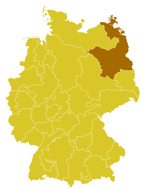 Beschreibung: Katholische Diözese/Bistum in Deutschland